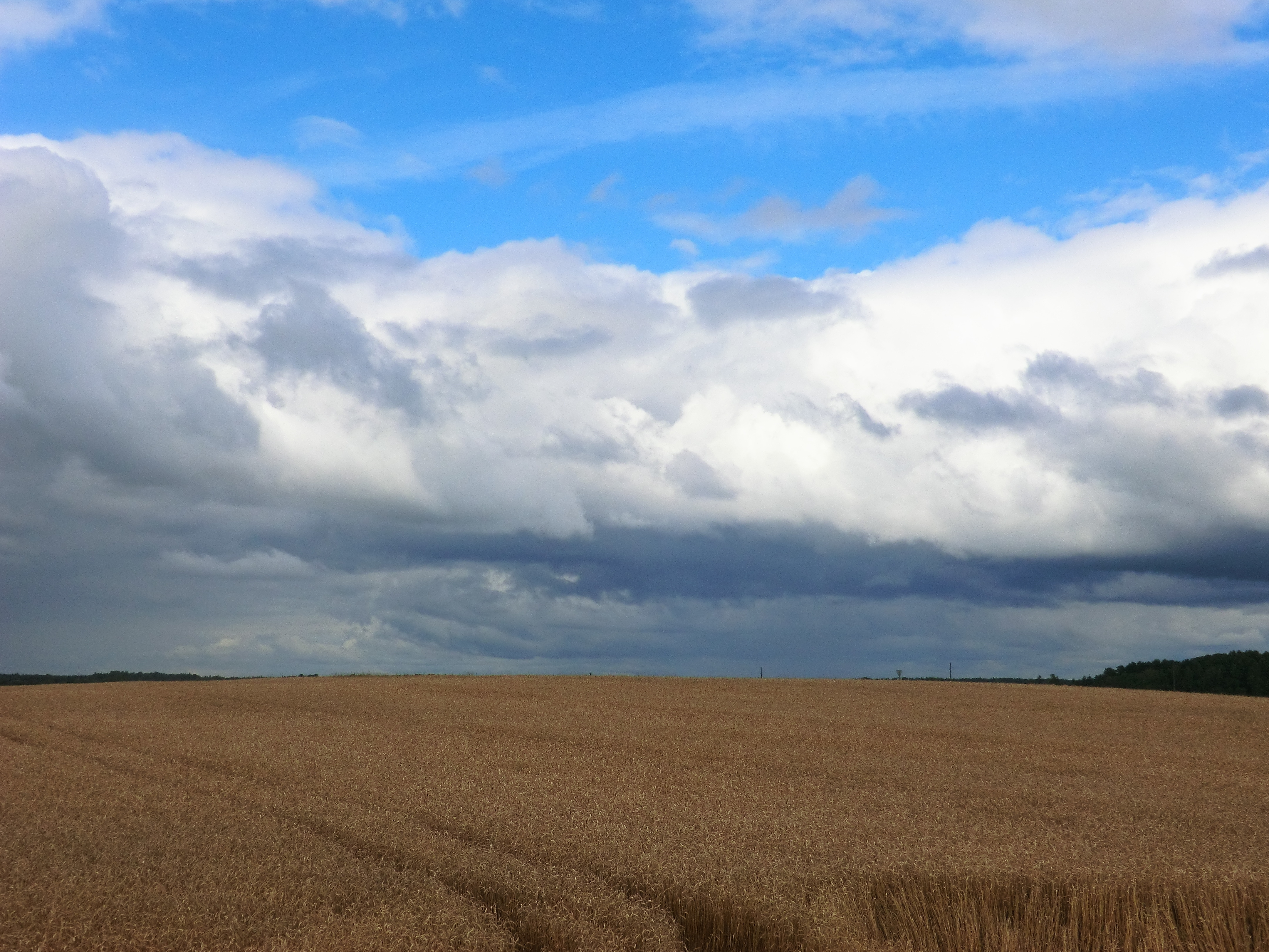 надвигается дождик